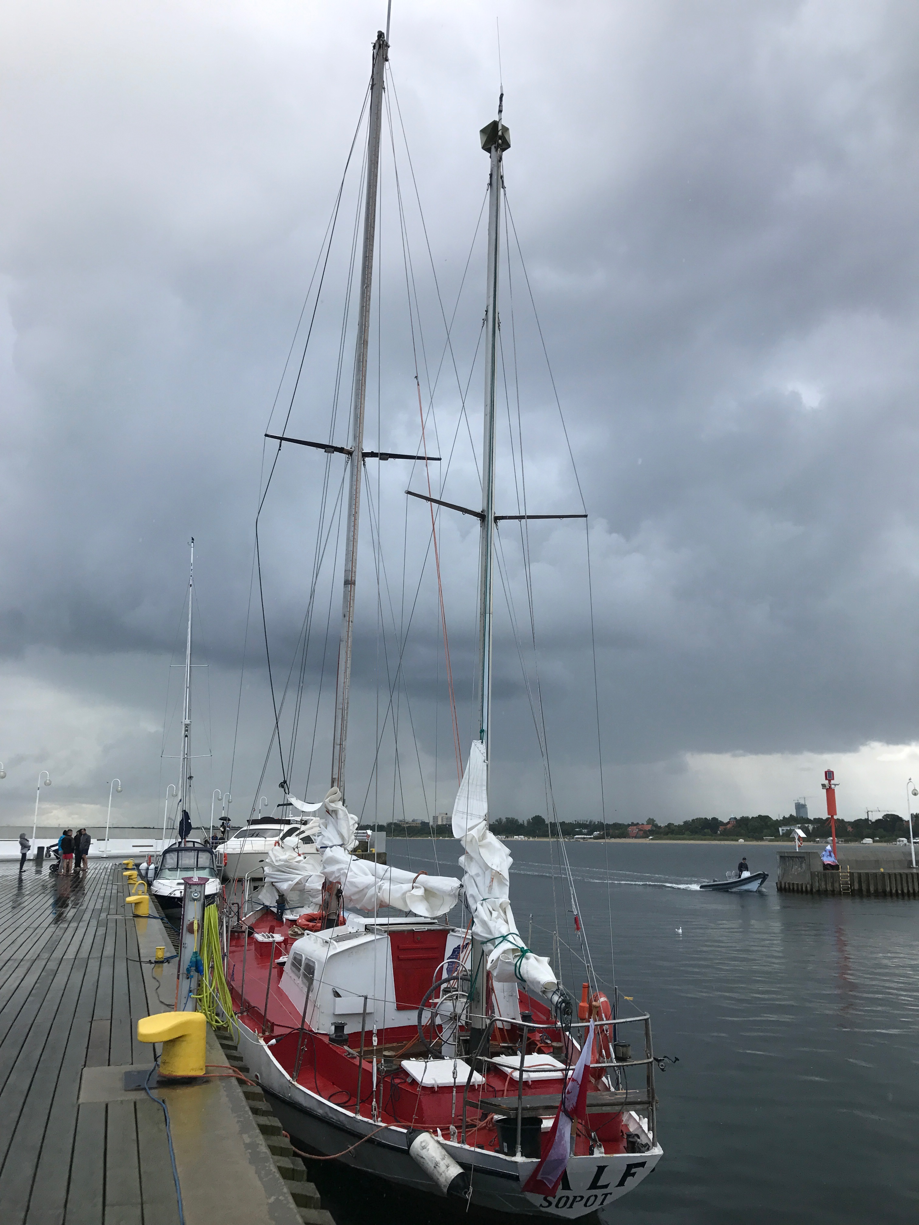 Sopot Marina - SY Alf